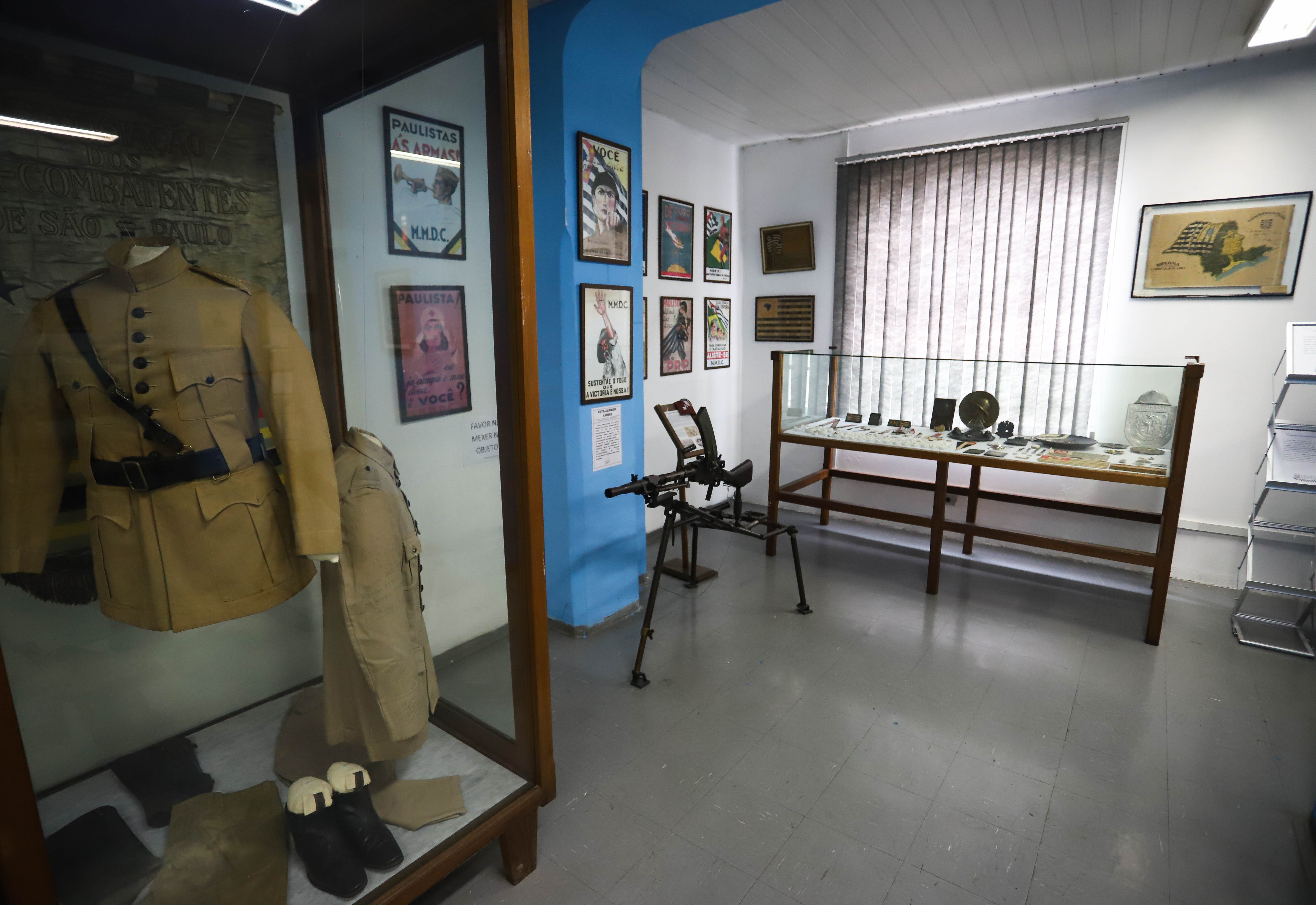 Museu da PM. Local: São Paulo/SP. Data: 16/05/2019. Foto: Governo do Estado de São Paulo